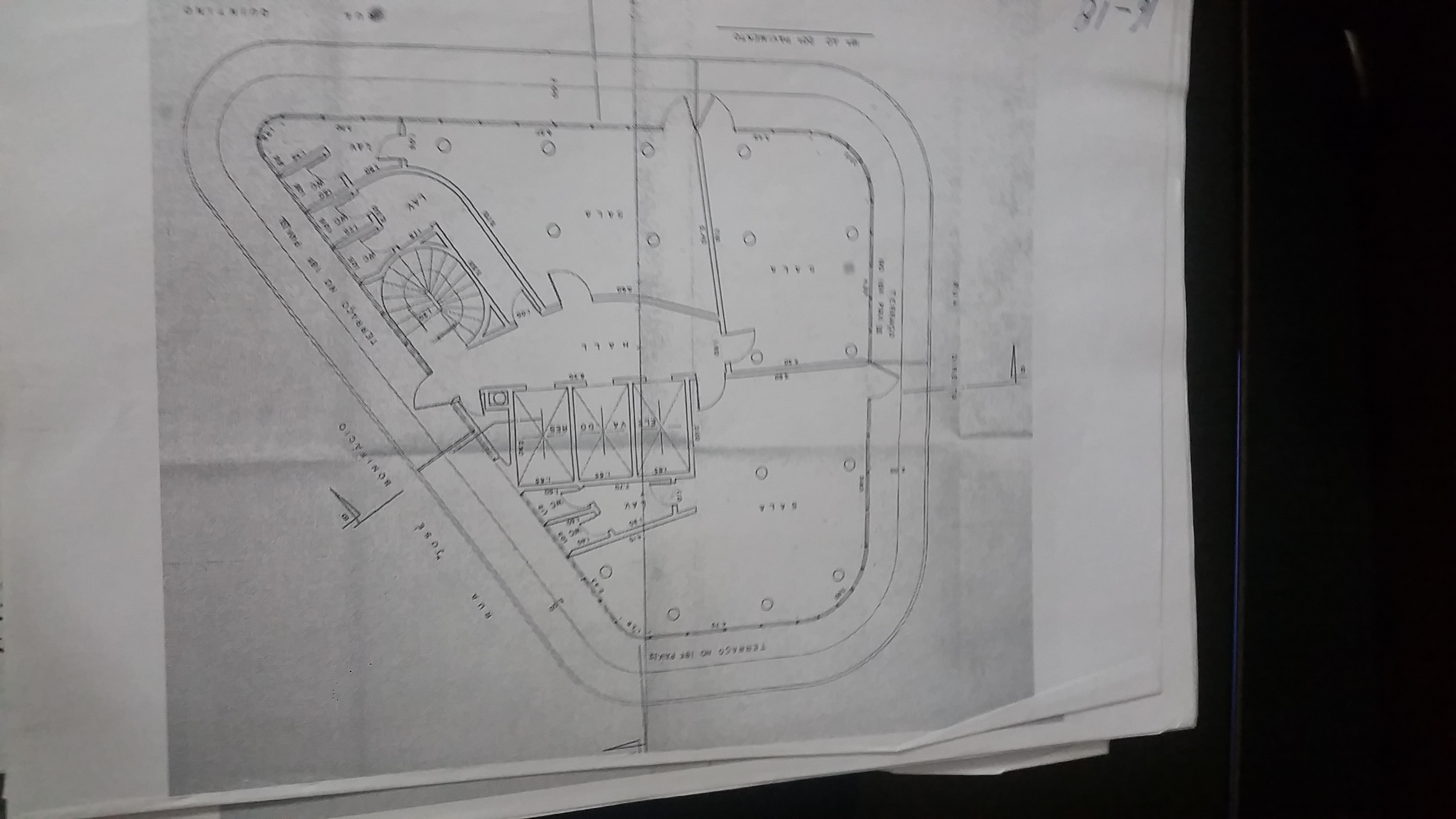 Foto do documento que traz um esboço da planta do Edifício Triângulo, em São Paulo (SP), Brasil